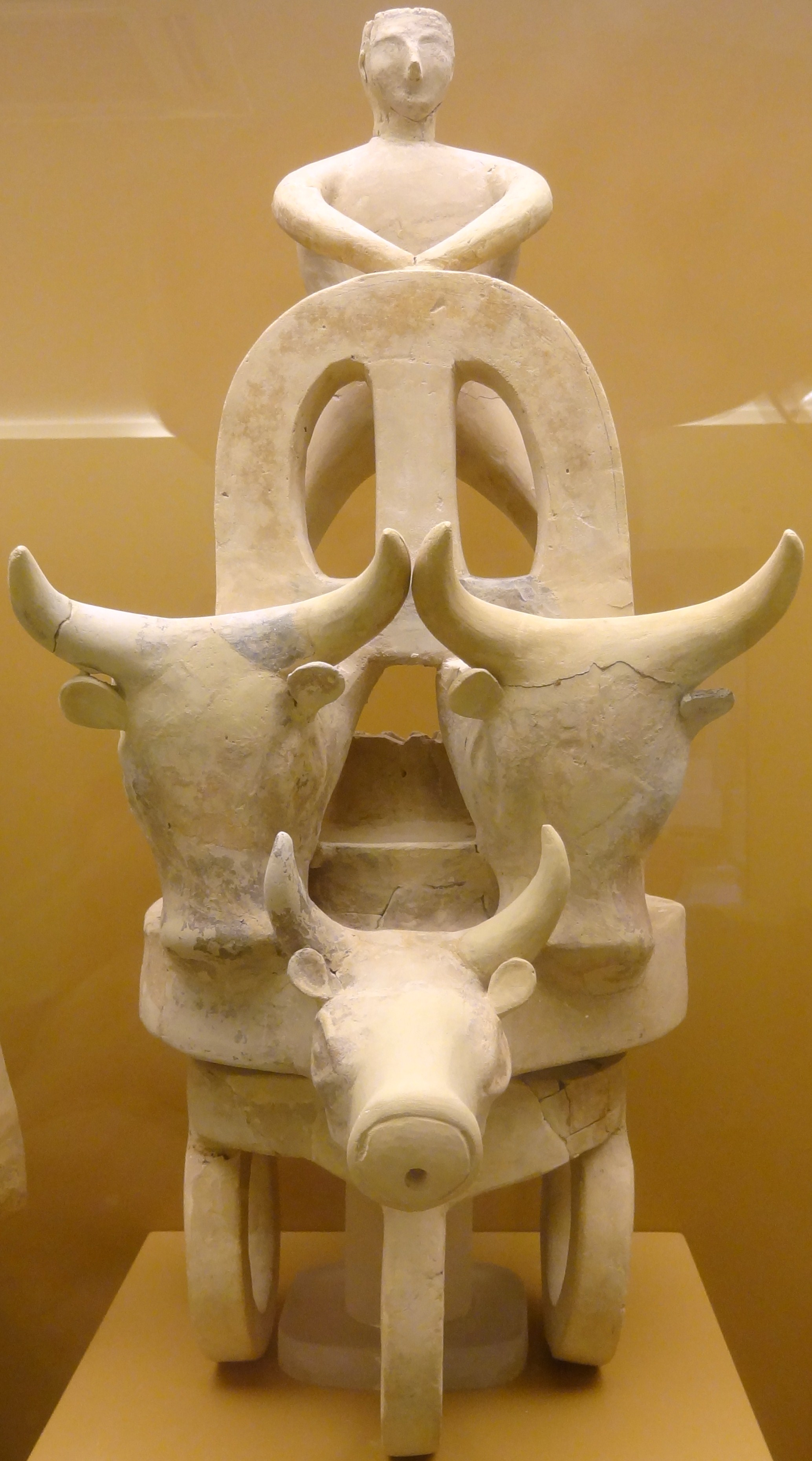 Terrakottadarstellung (Rython) eines von drei Ochsen gezogenen Wagens mit seinem Lenker (11. Jahrhundert v. Chr.) aus Raum 27 der Siedlung Karphi aus der spätminoischen Epoche SM III C, ausgestellt im Archäologischen Museum Iraklio, Kreta, Griechenland